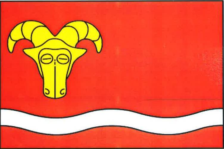 Třebosice vlajka